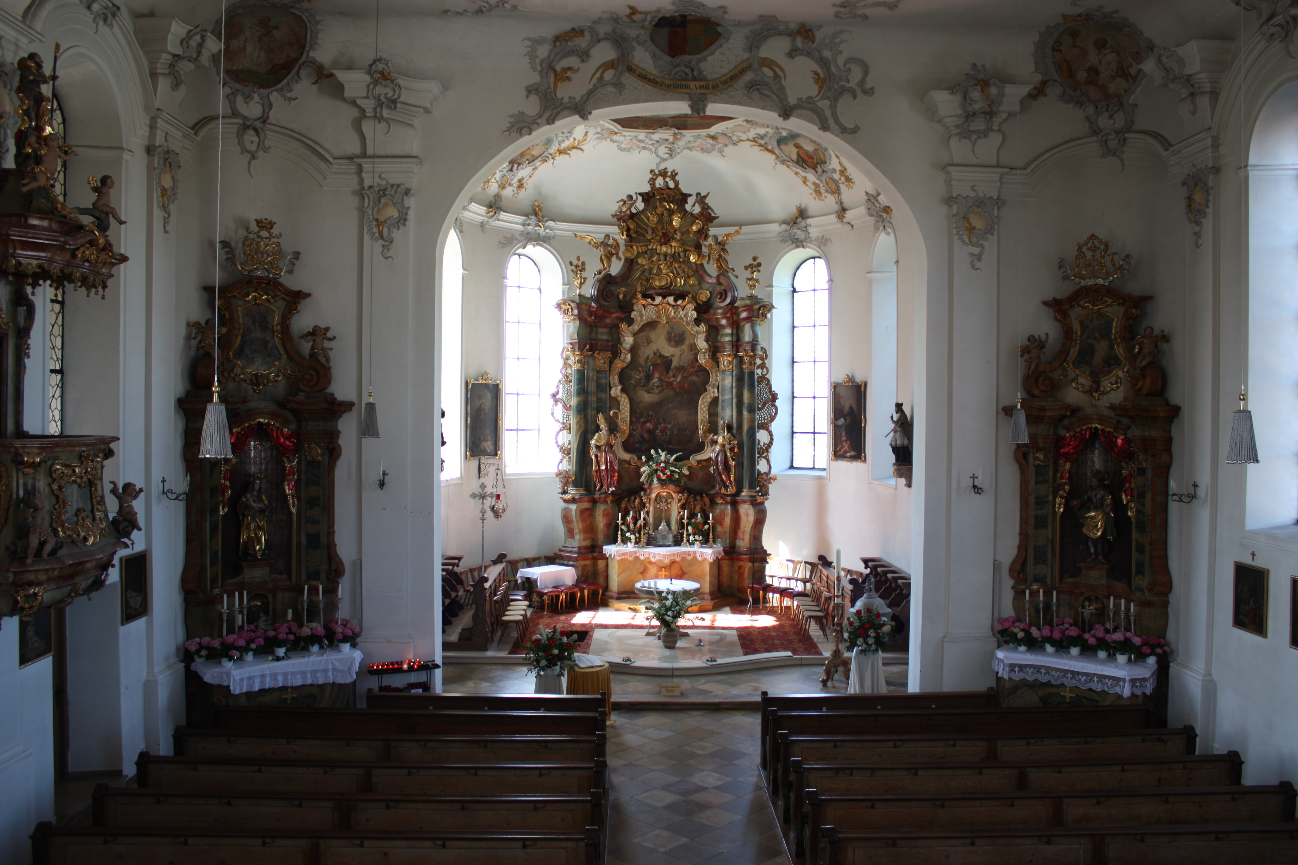 St. Ulrich (Amendingen)